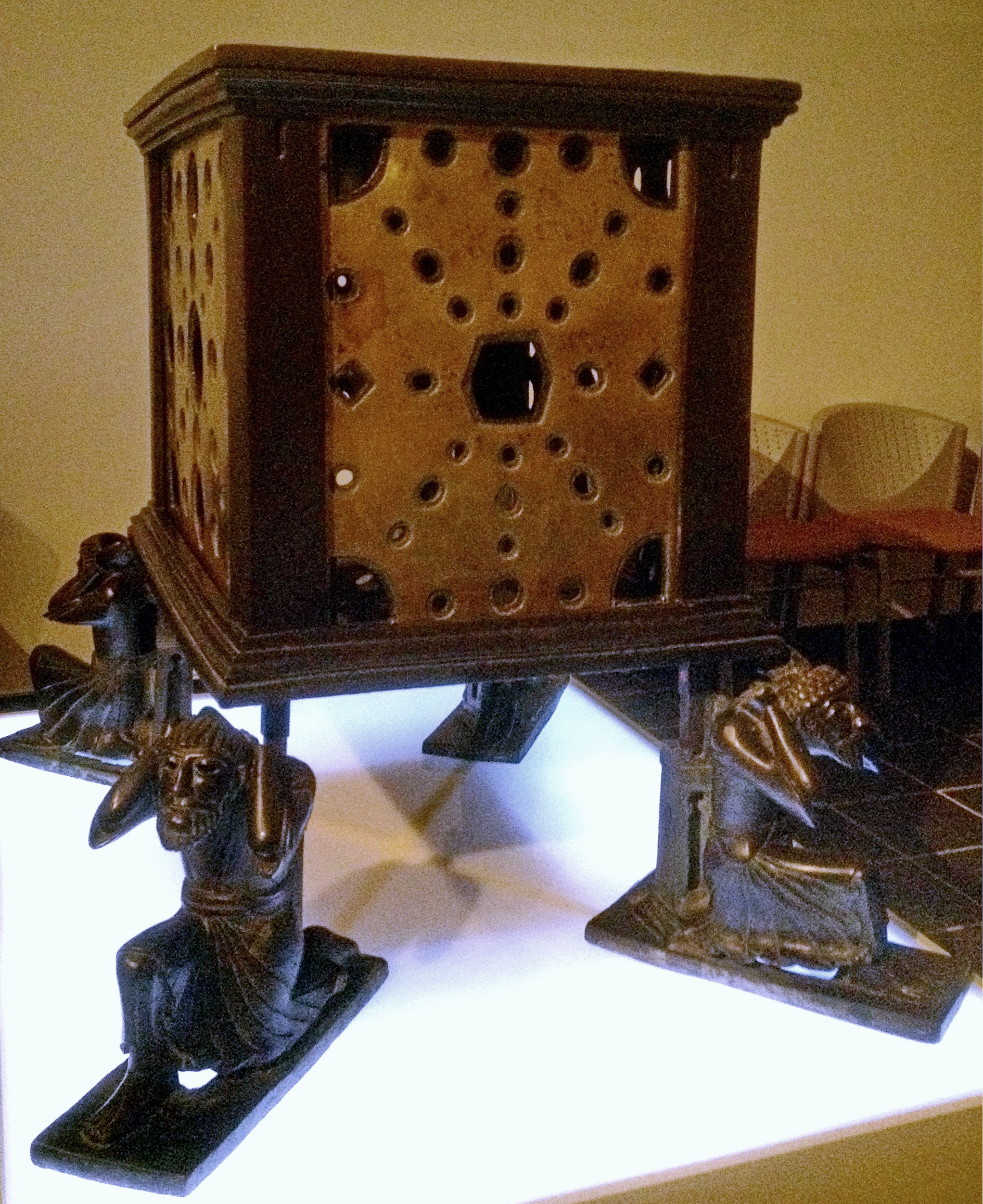 Krodoaltar